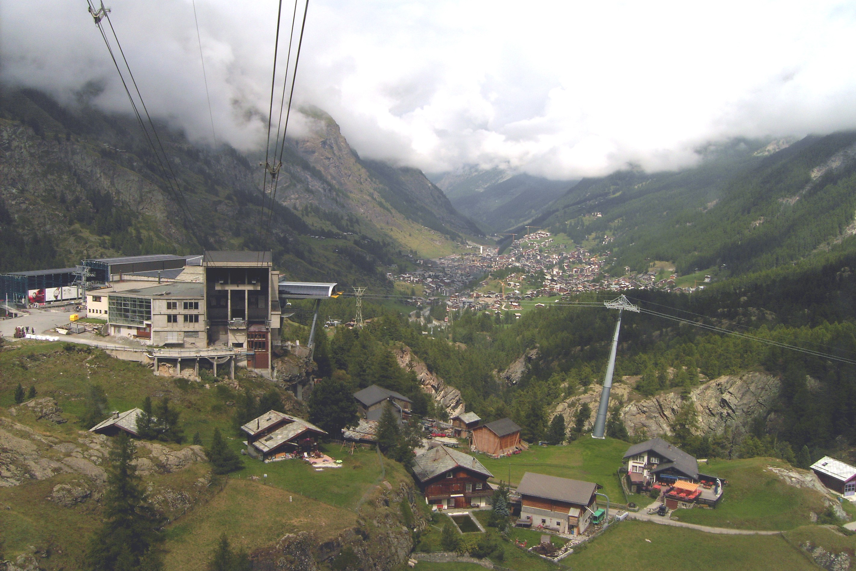 Seilbahnstation Furi von Seilbahn Richtung Trockener Steg fotografiert, im Hintergrund Zermatt